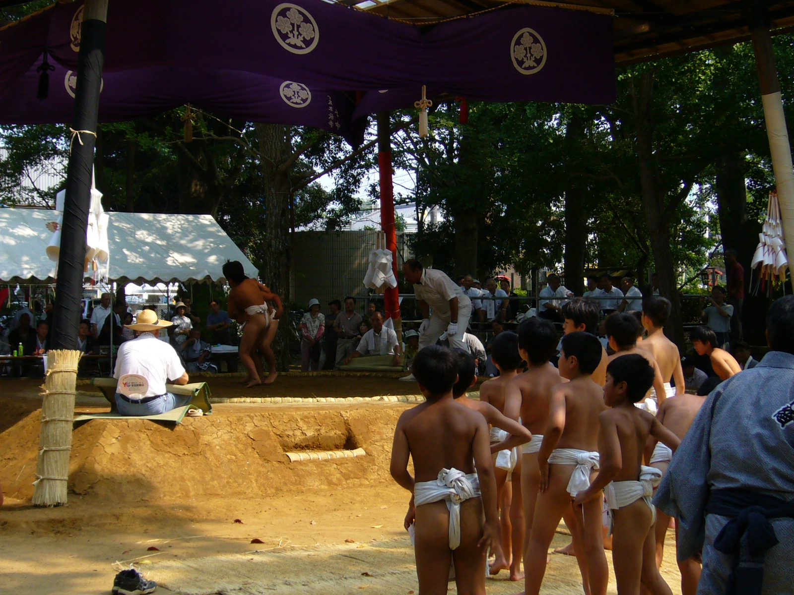 sasagawa-sumo,suwa-shrine,tonosho-town,chiba,japan